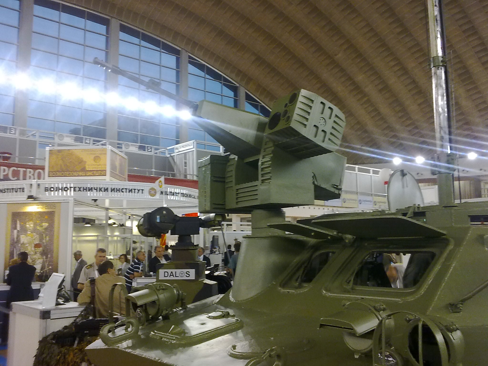 Купола возила Курјак са митраљезом 12.7мм